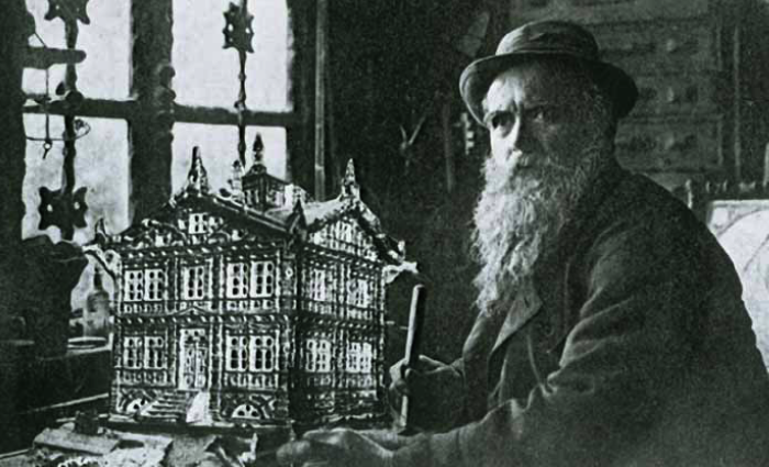 Karl Junker (um 1900) mit einem Modell seines Hauses („Junkerhaus“), an dem er viele Jahre arbeitete.